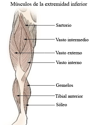 Muslo anterior